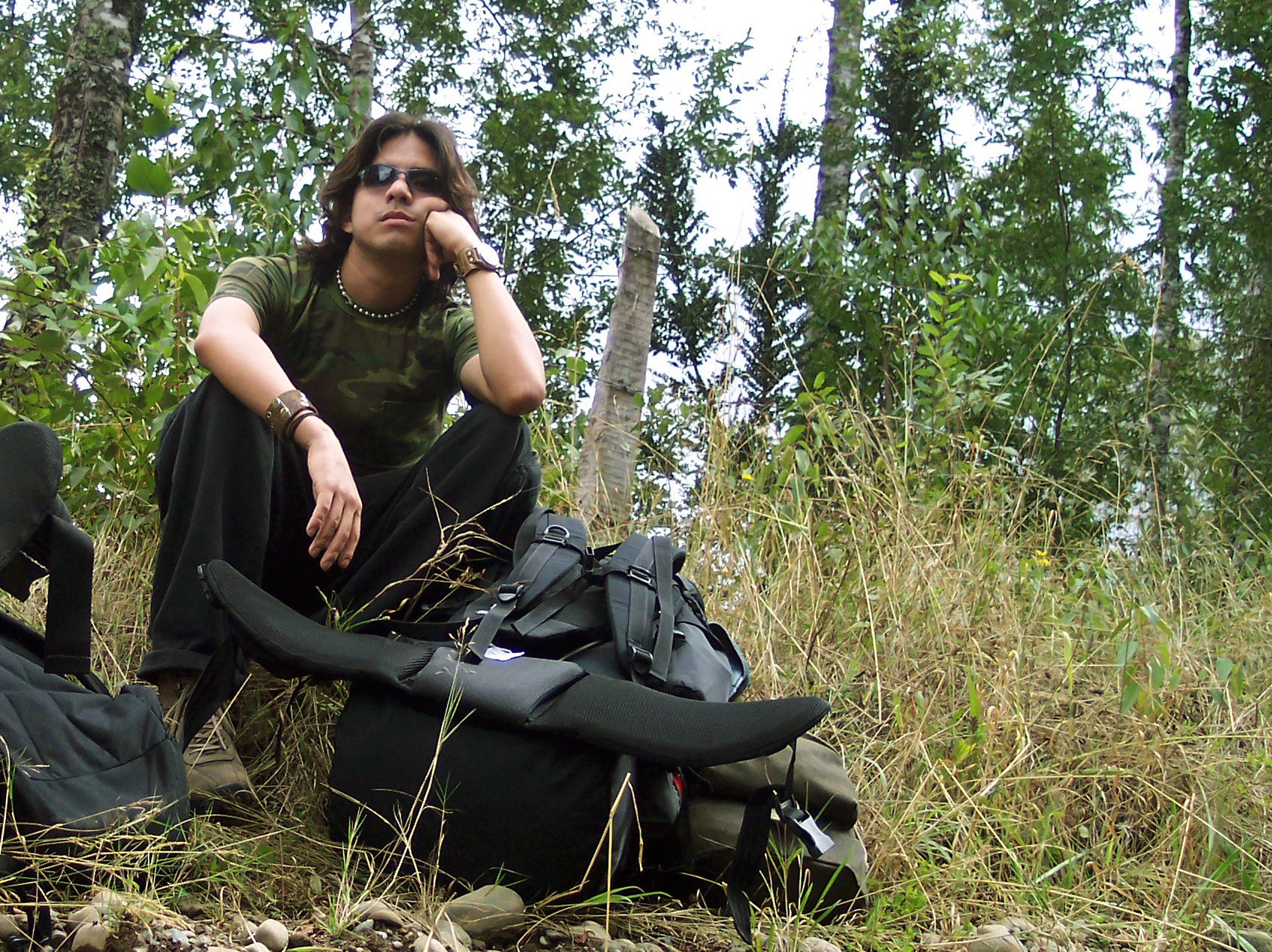 Mochilero